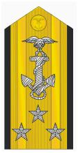 Vice almirante